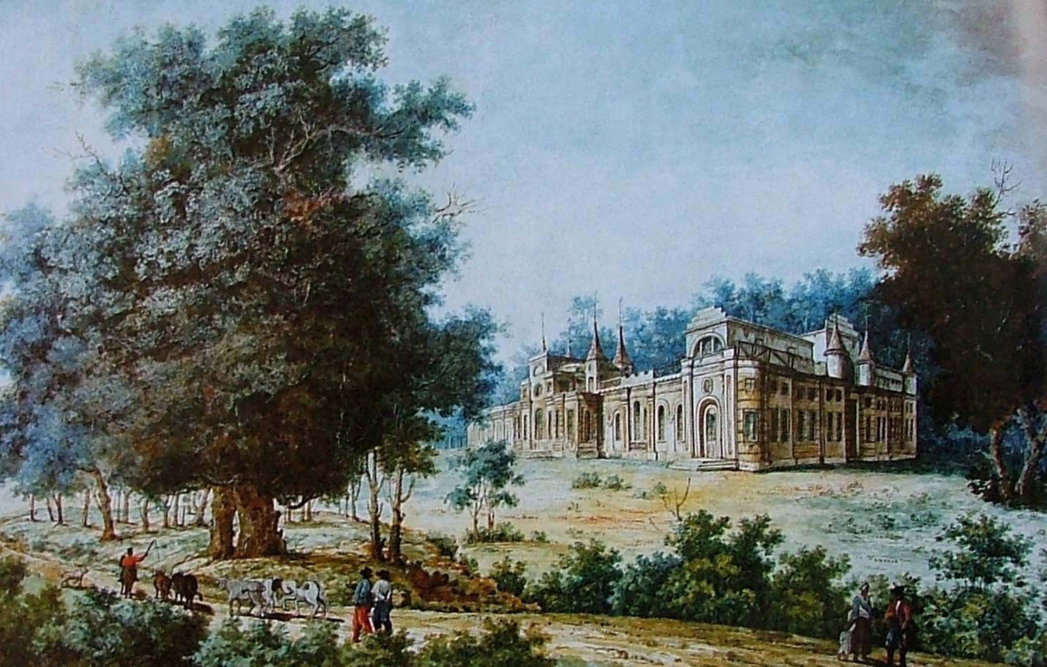 А. Кунавин. Дворец Румянцева в Качановке. Кон. 18 ст.